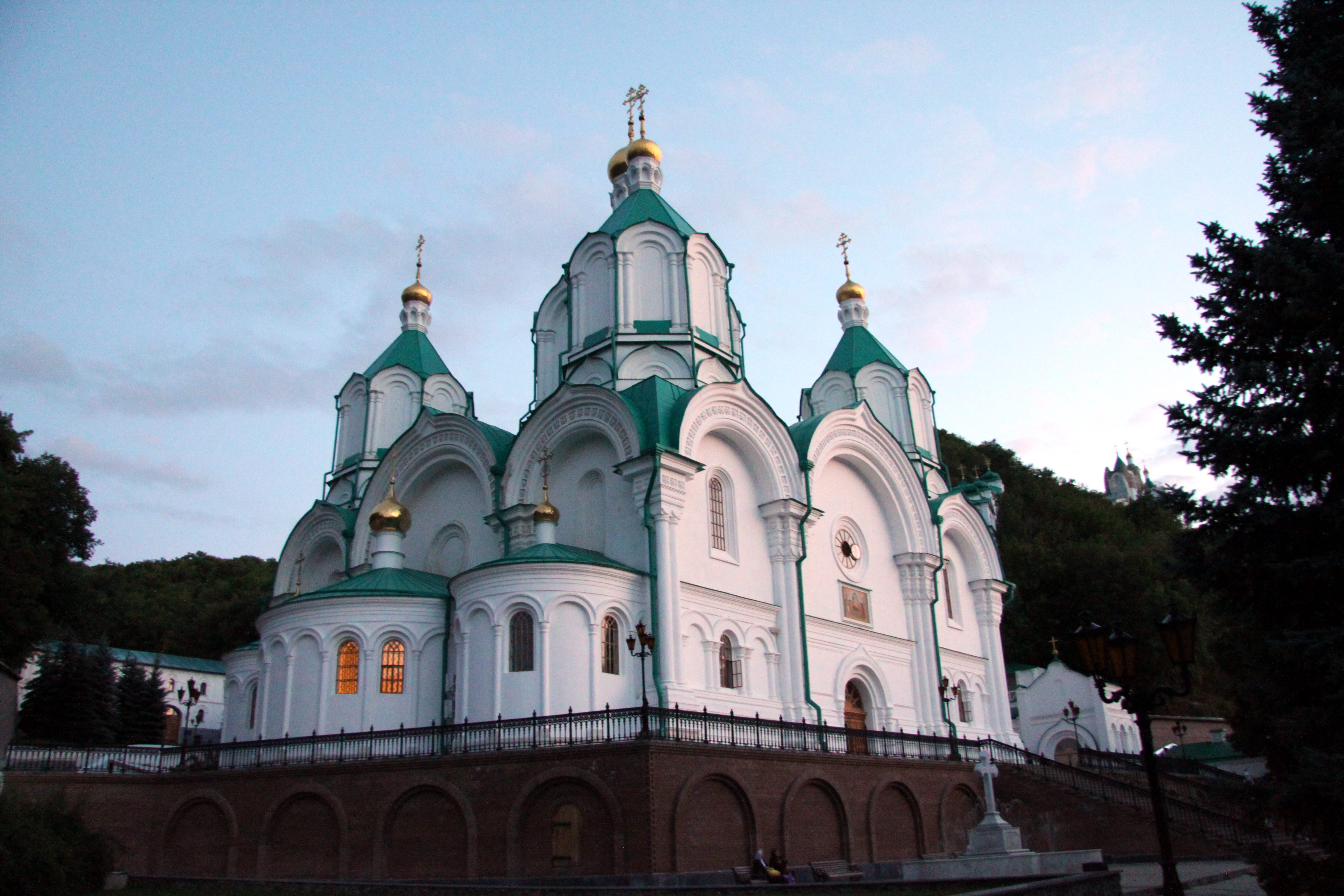 Святогірський Успенський монастир (мур.):, Святогірськ, м.Слов'яногірськ - 1